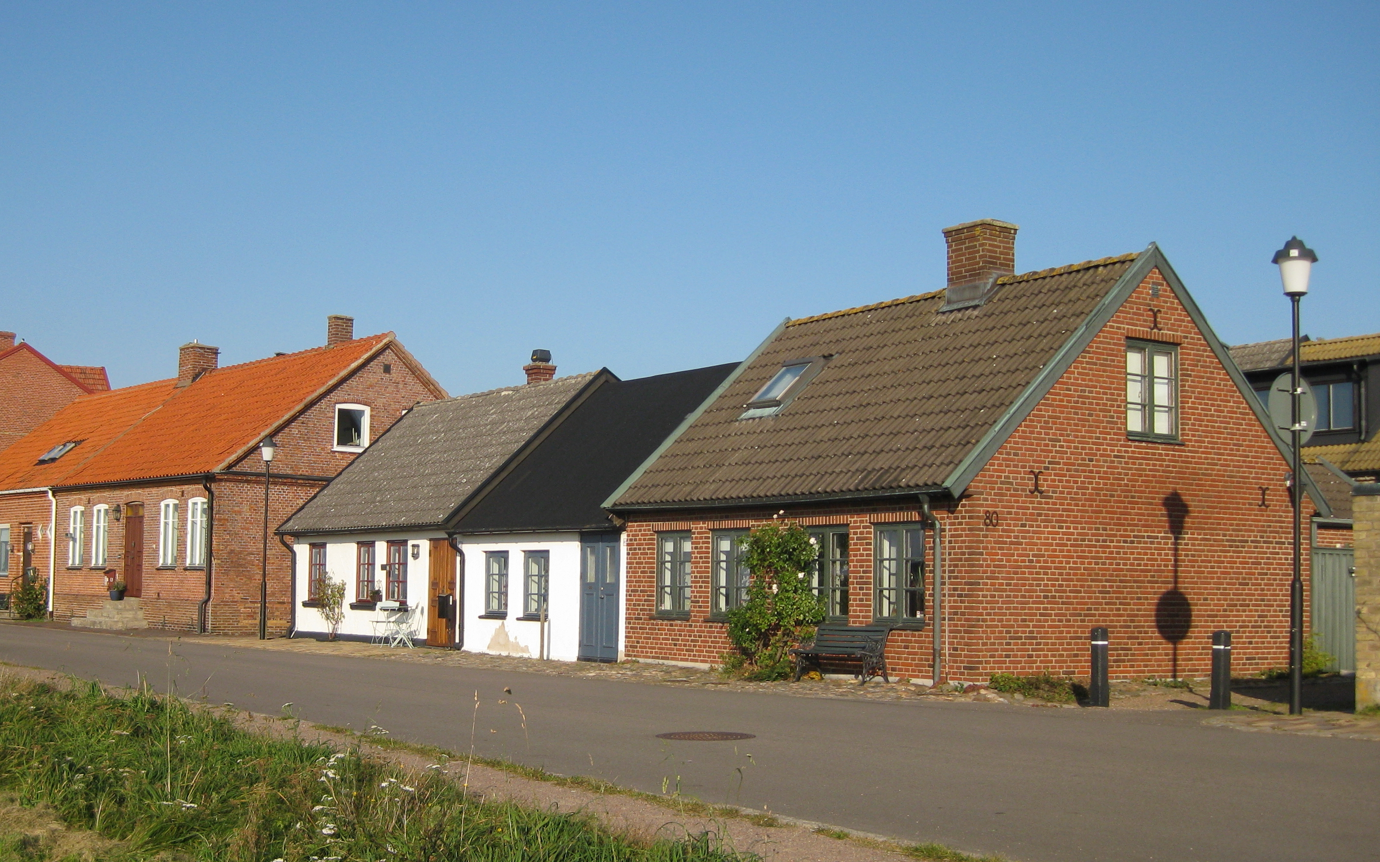 Borstahusen, Landskrona, Skåne, Sweden